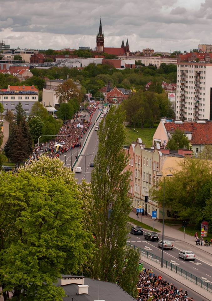 Parada Wydziałów na ulicach Olsztyna